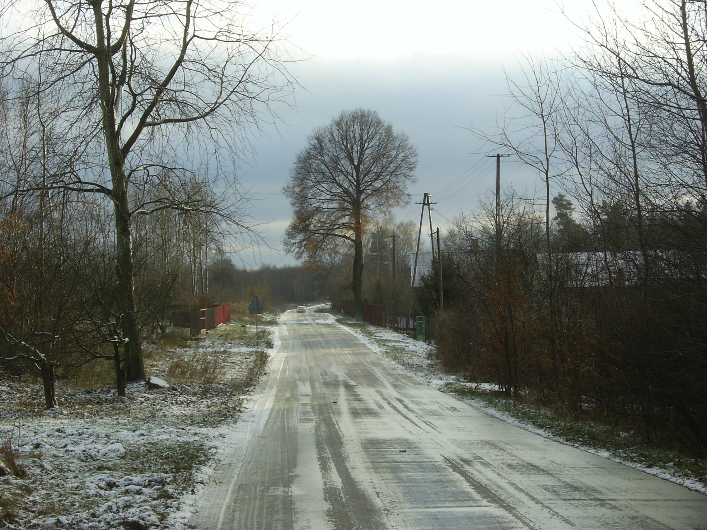 Szosa w Wywozie